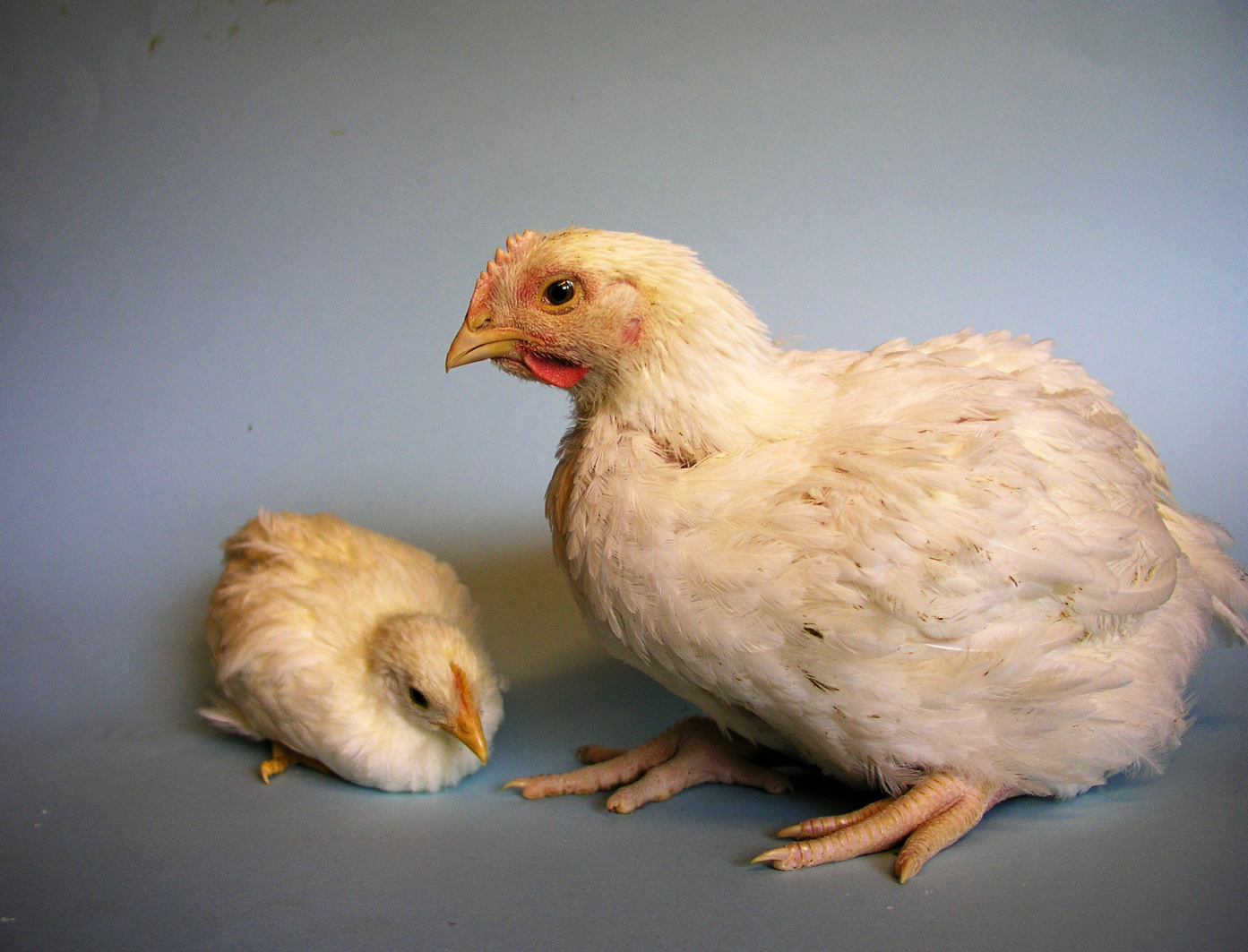 Das Bild ist Teil eines Bildvergleiches zweier zum gleichen Zeitpunkt geschlüpfte Küken einer Legehybridlinie (linkes Küken im Bild) und einer Masthybridlinie (rechtes Küken im Bild) im Alter von 3 bis 34 Tagen. Mit zunehmendem Alter wachsen die Tiere immer mehr auseinander. Nach vier Wochen wiegt ein Legeküken, das am selben Tag geschlüpft ist wie ein Mastküken, nur gerade halb soviel.Nach 40 Tagen, sind die Mastküken schon schlachtreif, die Legeküken haben noch kaum Fleisch angesetzt. Das Mastküken ist schon vor Ende der Mastzeit nicht mehr fähig, für eine Foto ruhig neben dem Legeküken zu stehen. Es wiegt zuletzt rund 1,8 kg und kann seinen enormen Fleischberg und die übermässige Brust kaum mehr tragen und sinkt immer gleich nieder ein. Die Bilder stammen aus folgendem Artikel: 3. Tag 12. Tag 18. Tag 29. Tag 34. Tag